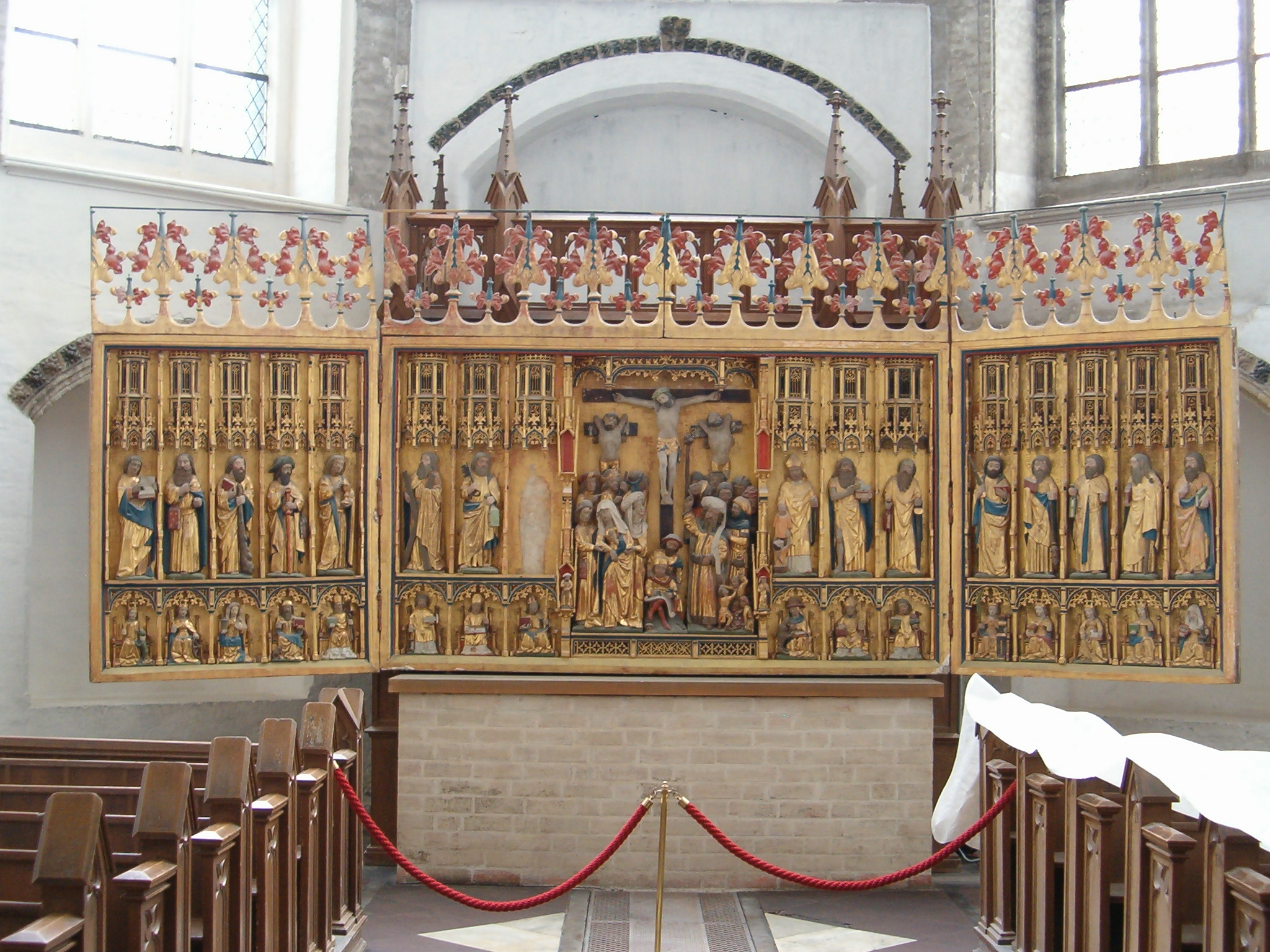 Ehemaliger Hochaltar der Nikolaikirche im nördlichen Querhaus.